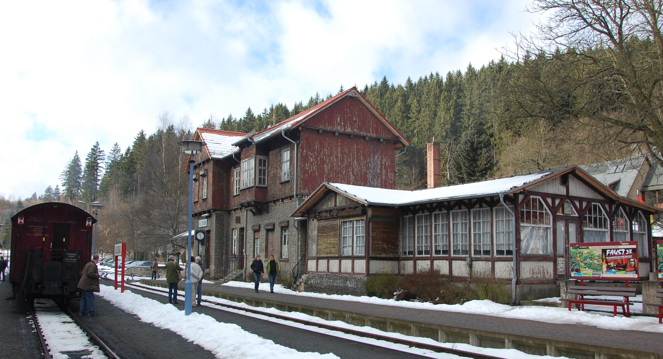 Haus Kreisstraße 5 in Alexisbad